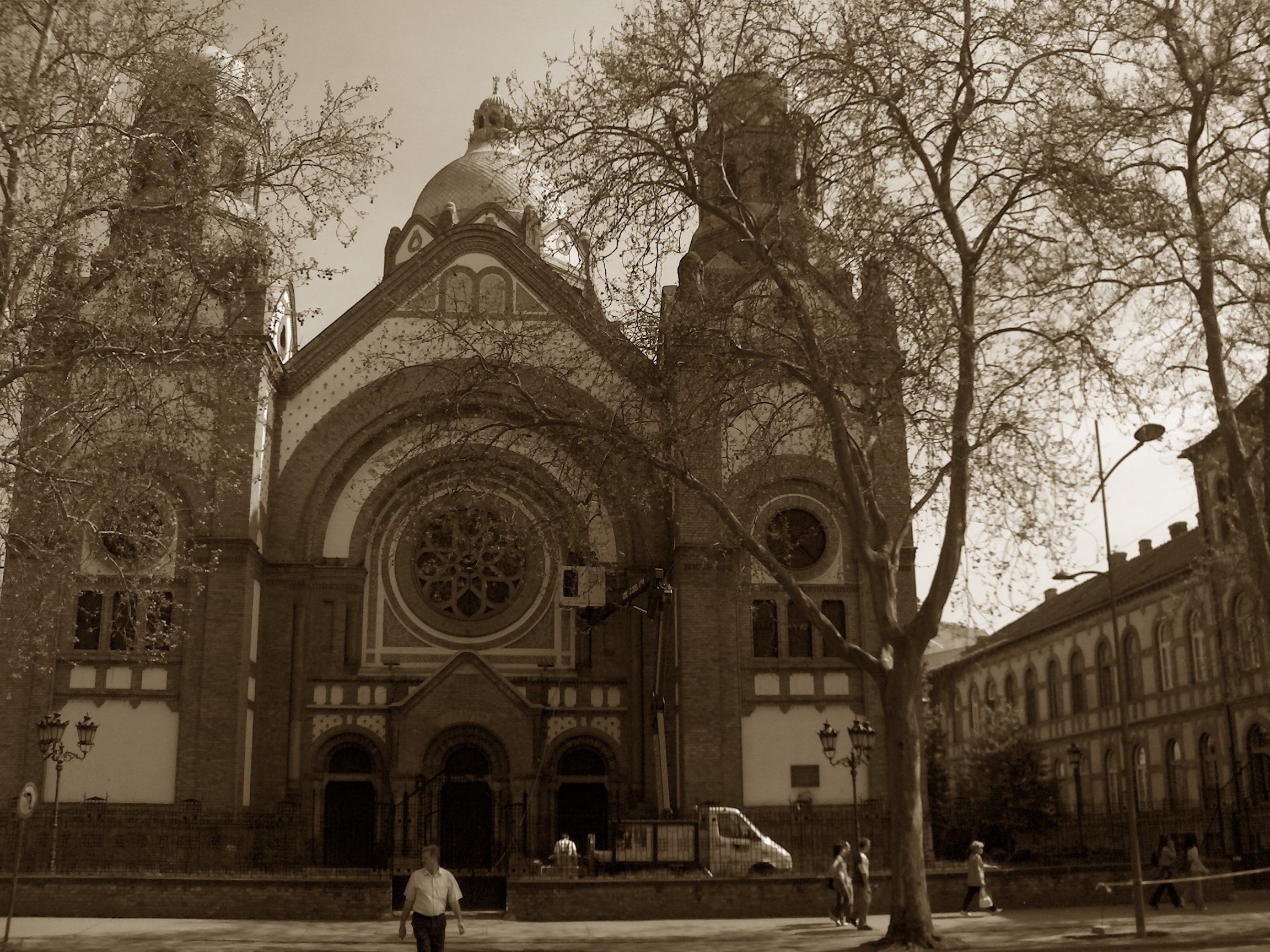 Sinagoda_NS